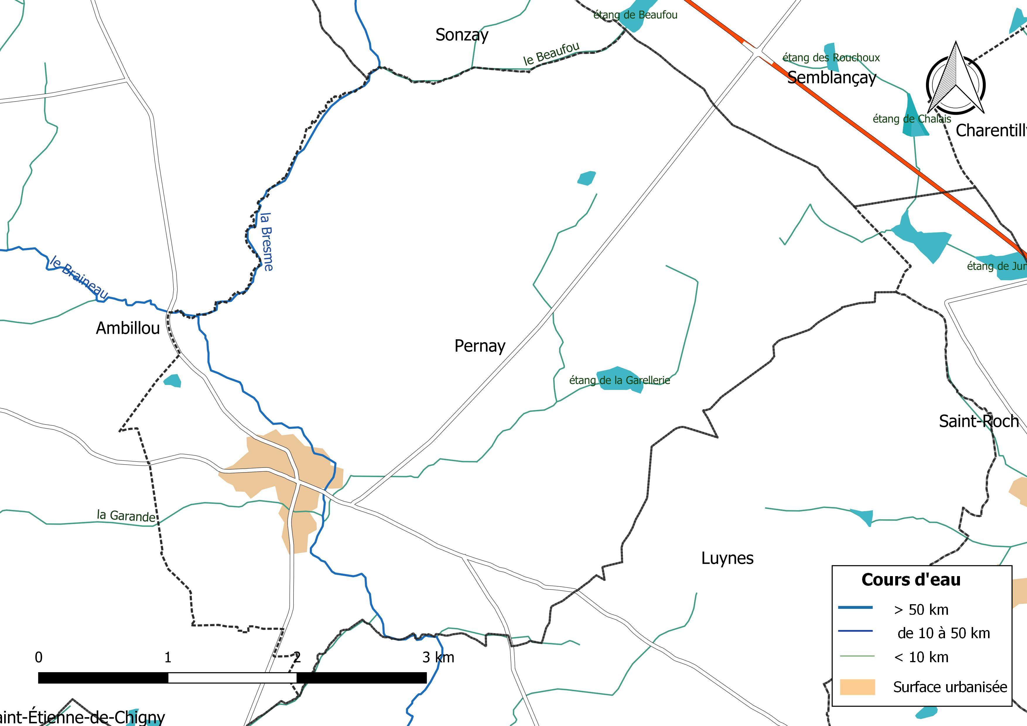 Carte du réseau hydrographique de la commune de Pernay (France).